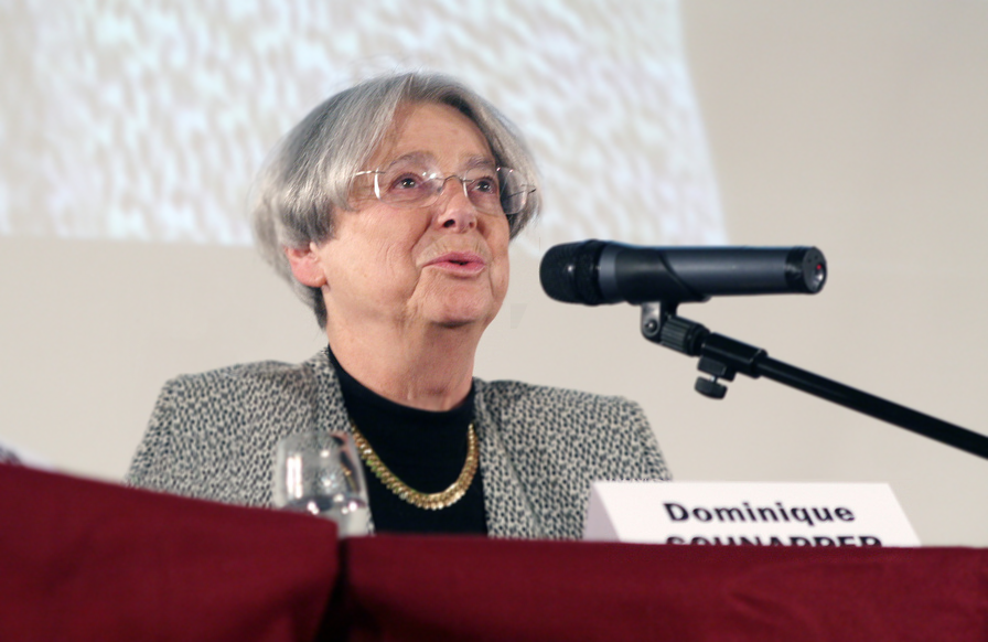 Œuvre dérivée de File:Portrait de Dominique Schnapper.jpg visant à la rendre plus lisible